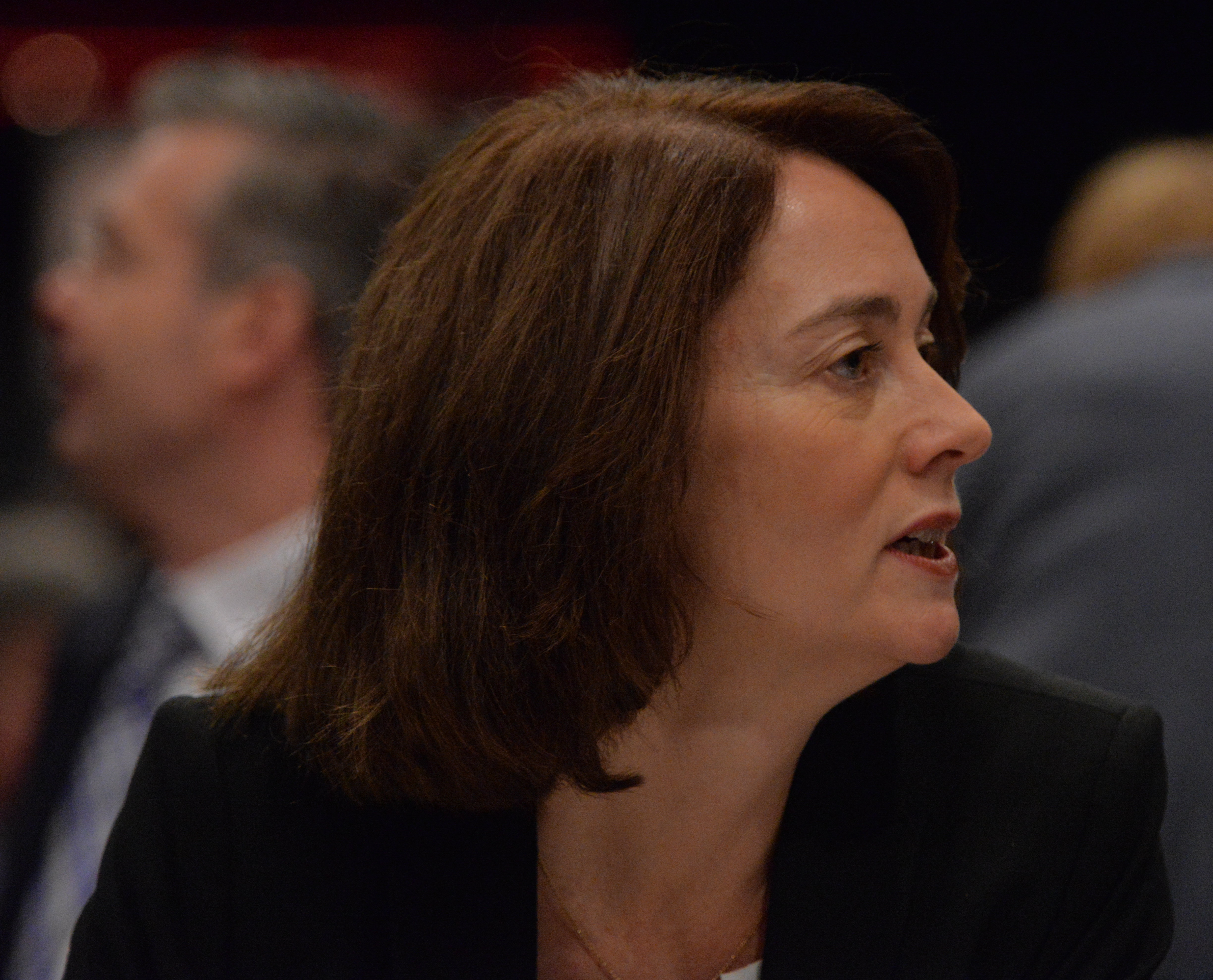 SPD Bundesparteitag Berlin, 10.-12. Dezember 2015, CityCube, Messe Berlin